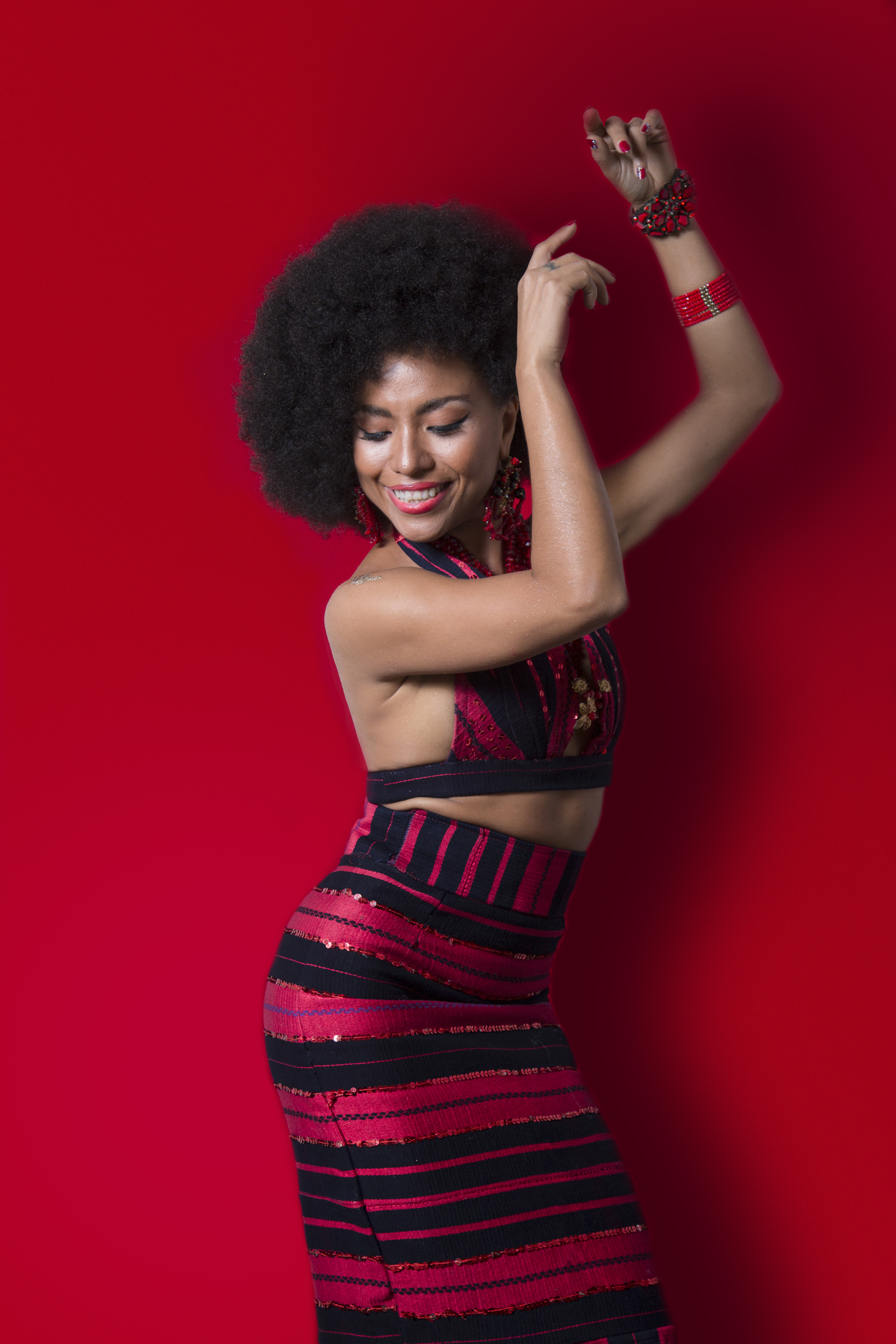 Sesión fotográfica para la revista Socialmente de Oaxaca